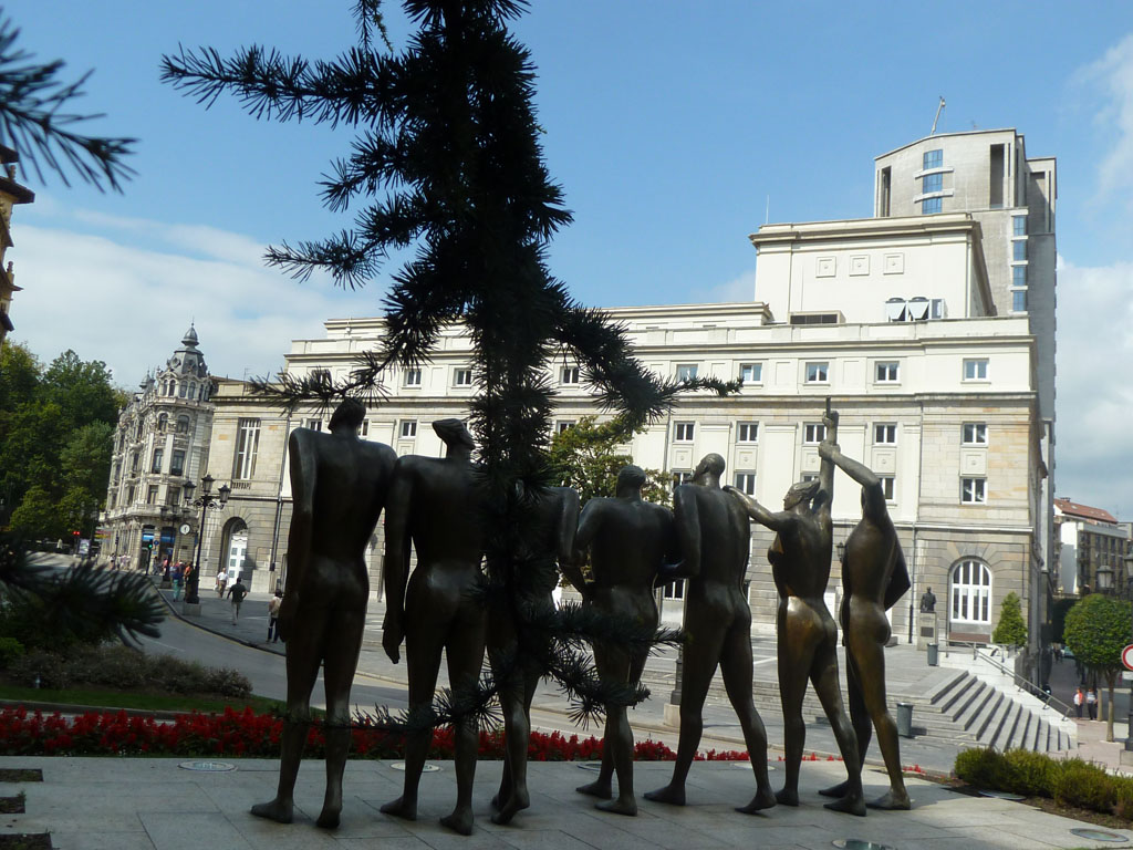 Autora.- Esperanza D´Ors, 1997. Plaza del Carbayón. Oviedo